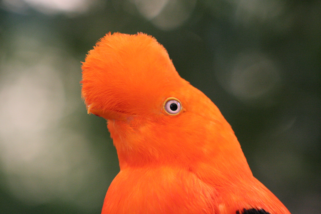 Rupicola peruviana, male